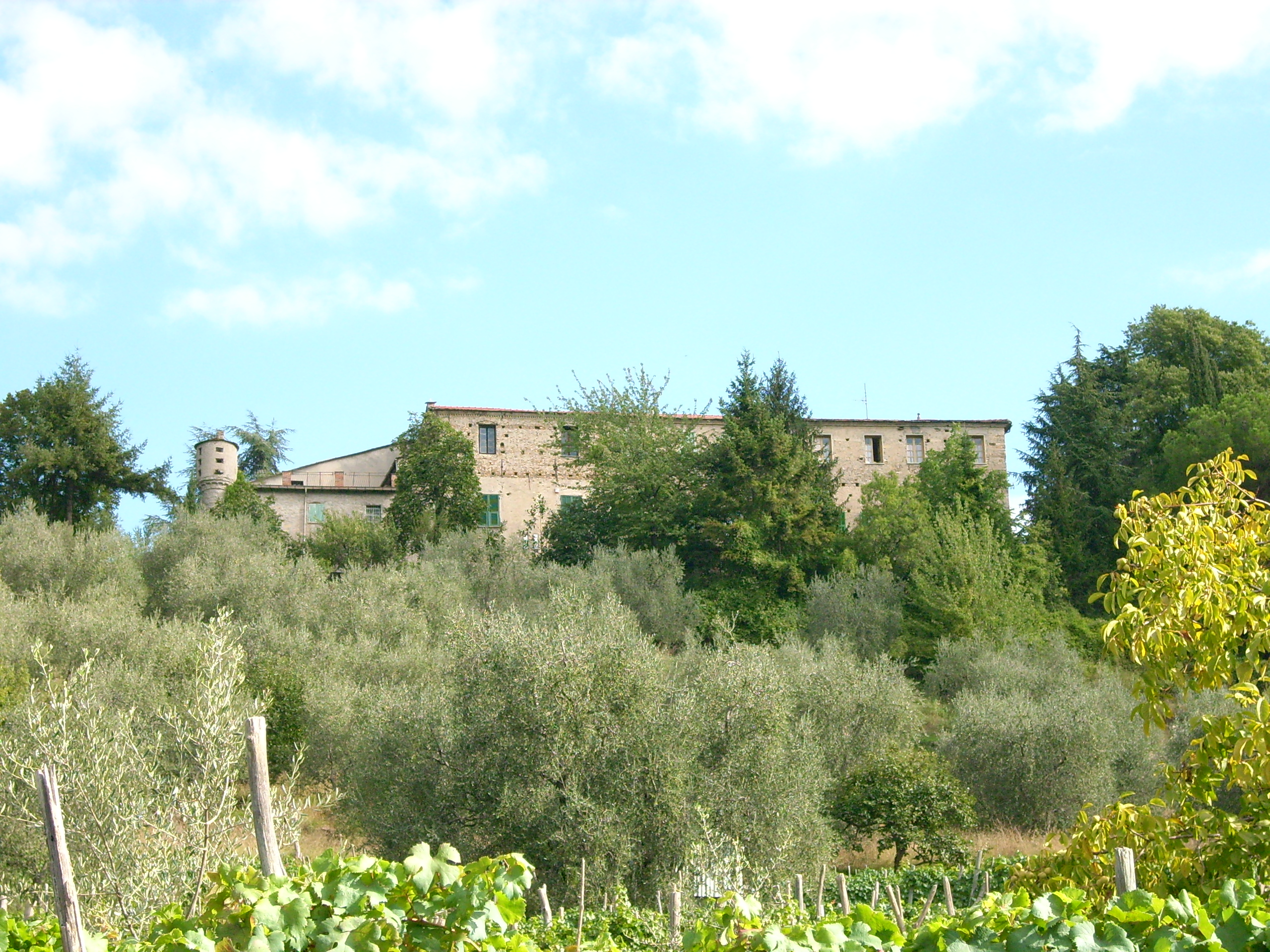 Castello di Pornassio, Liguria, Italia